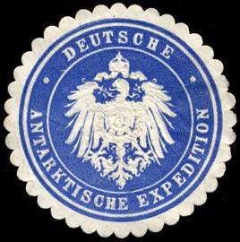 Sealing stamp Title: Deutsche Südpolar Expedition Description: blau, weiß, geprägt Place: size: 4 cm